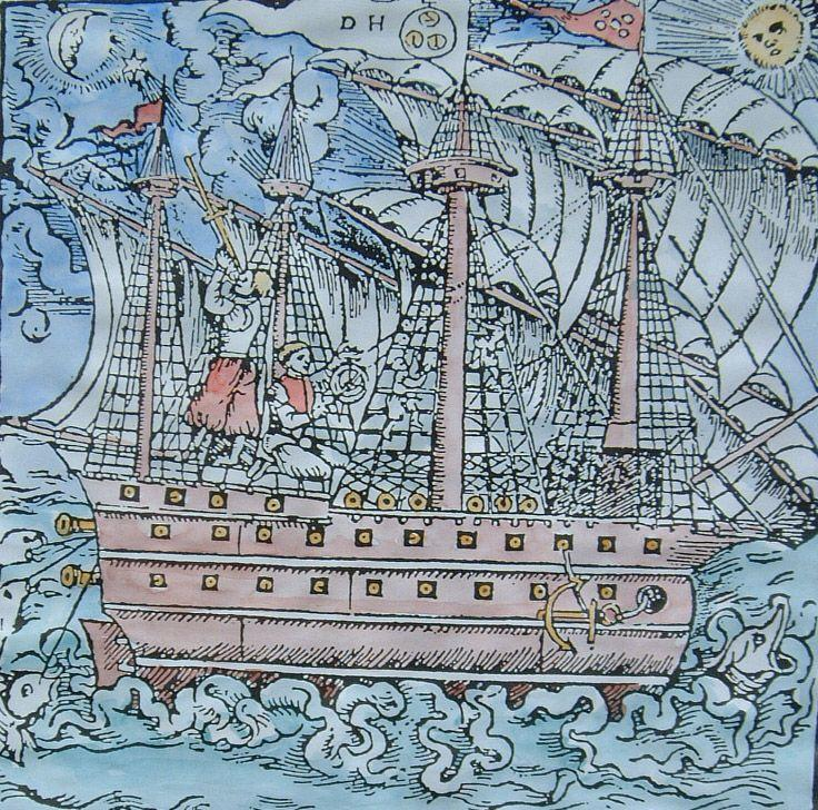 Xilogravura de Hans Staden, 1547, posteriormente aguarelada. Pub. em Marbourg, por André Kolbe, 1557. Célebre gravura de Hans Staden, das mais divulgadas da História dos Descobrimentos e publicada na História do Brasil, é referida pelo autor como representando um trabalho efectuado no Funchal na sua viagem para o Brasil e antes de se deslocarem à costa de Marrocos, à antiga praça de Santa Cruz de Cabo de Guer, actual Agadir.